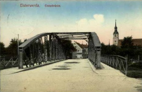 Die 1945 gesprengte Elsterbrücke von Elsterwerda um 1914